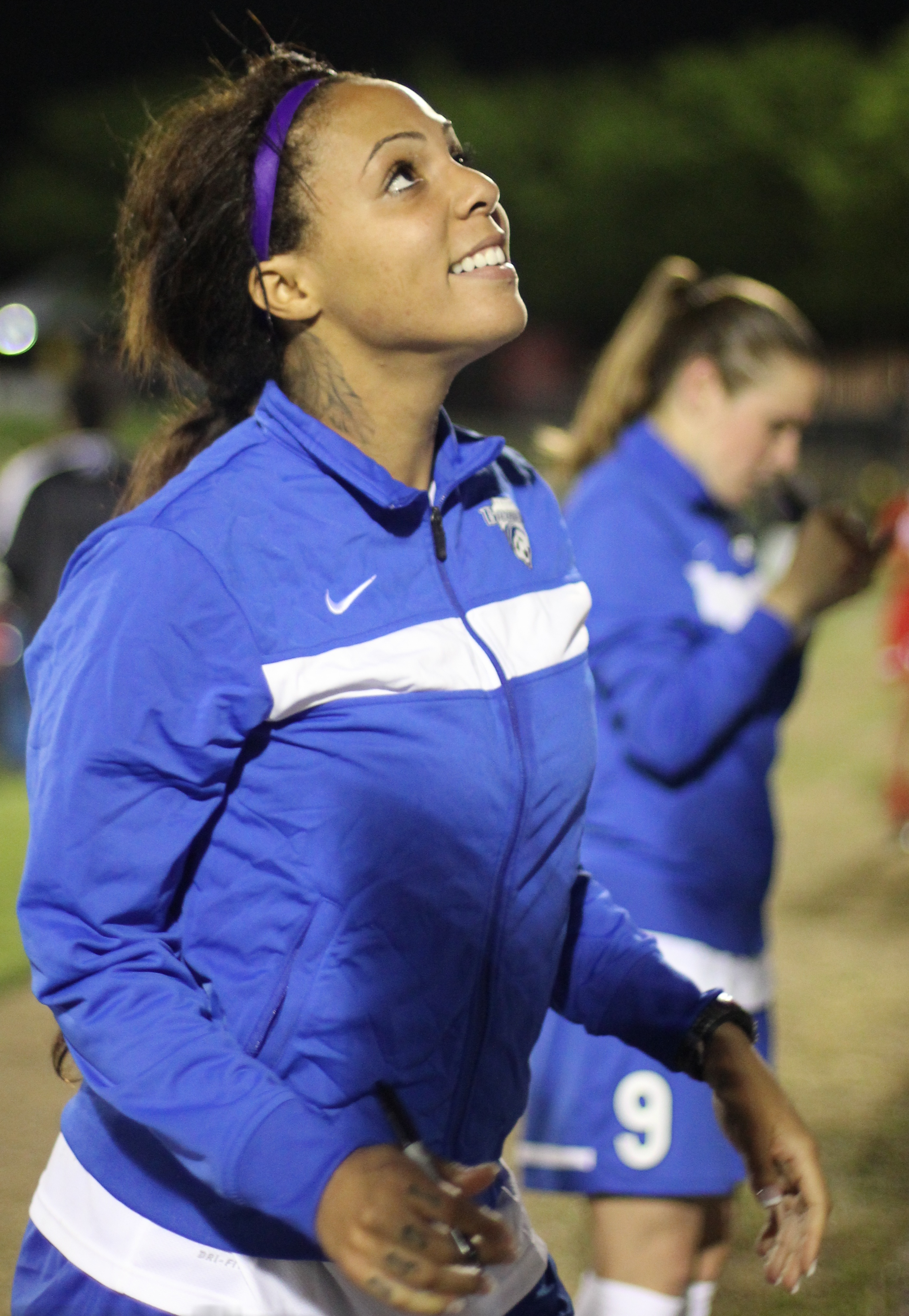 2013-05-11 Spirit - Breakers-137